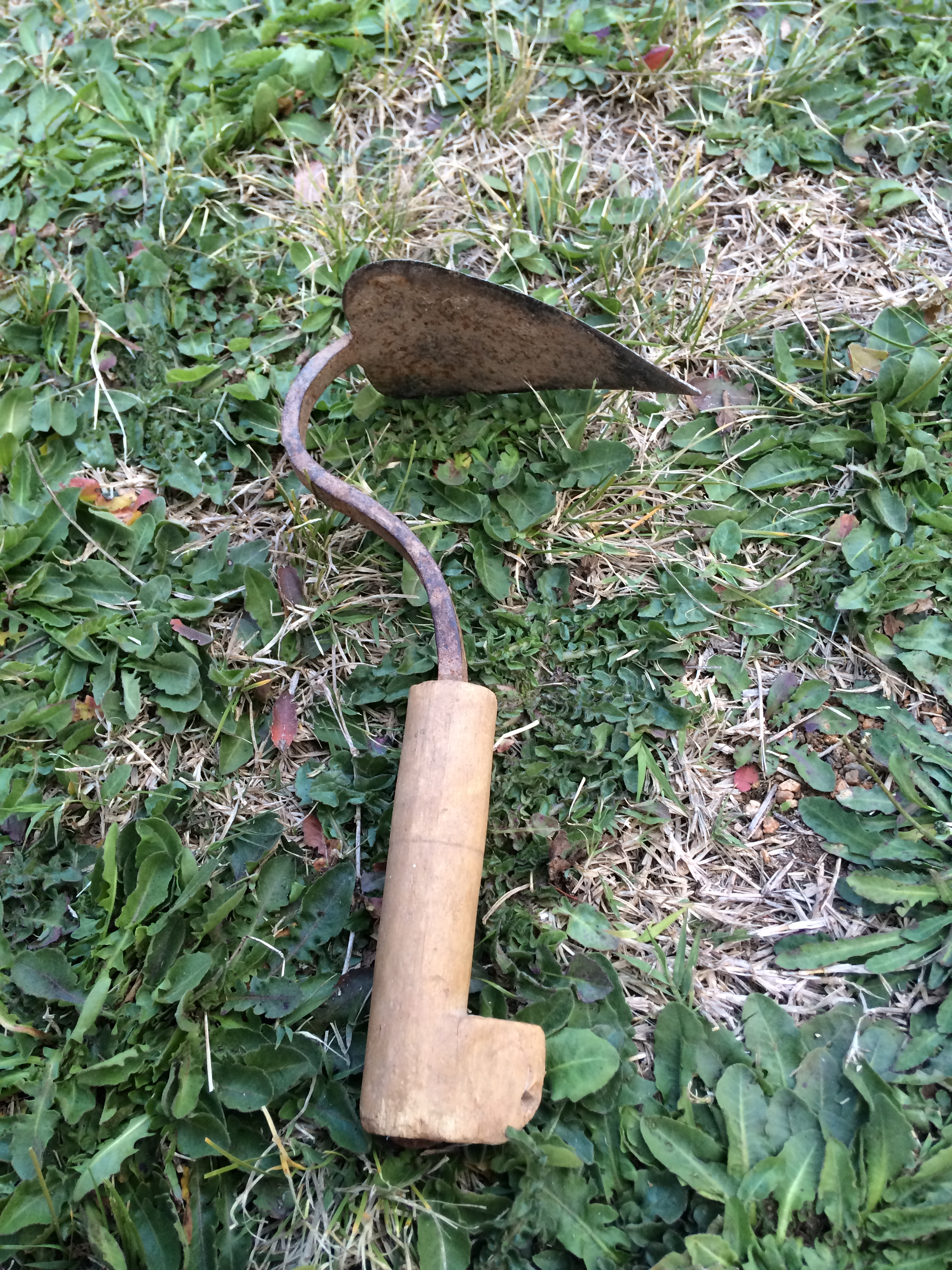 Apero de labranza para limpiar hierbas